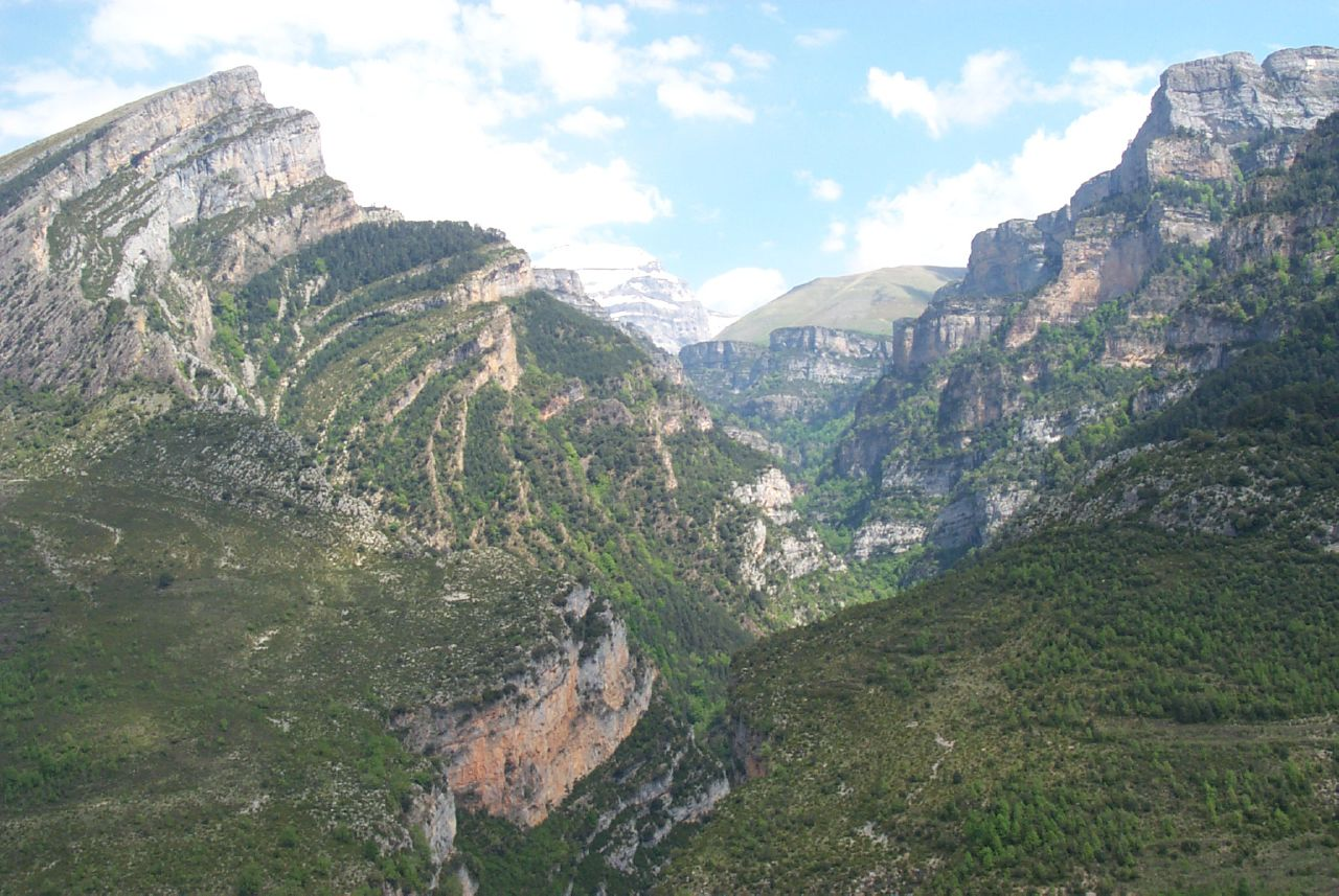 Cañon de Añisclo Huesca Aragón España Pirineo Ordesa.